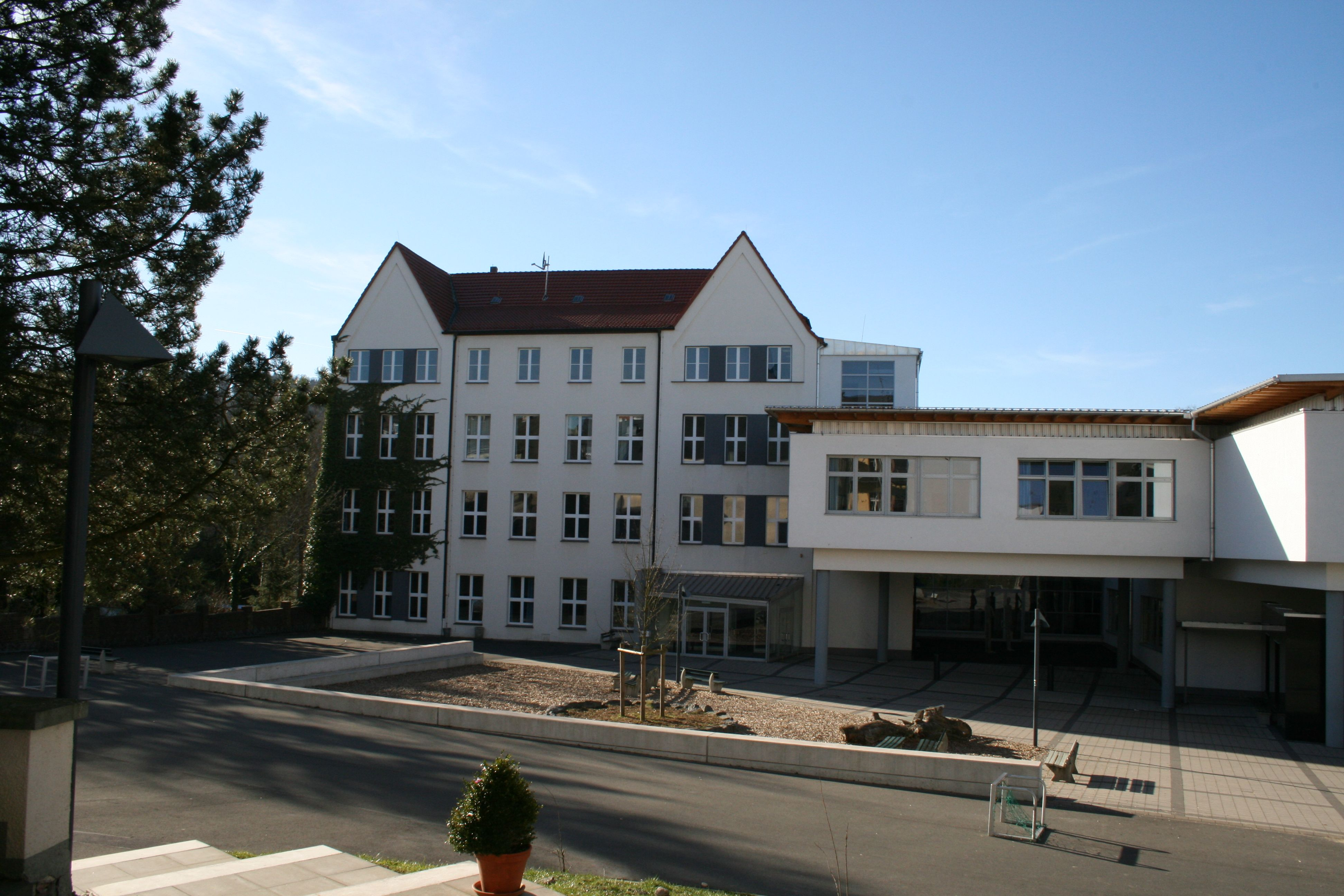 Mariengymnasium